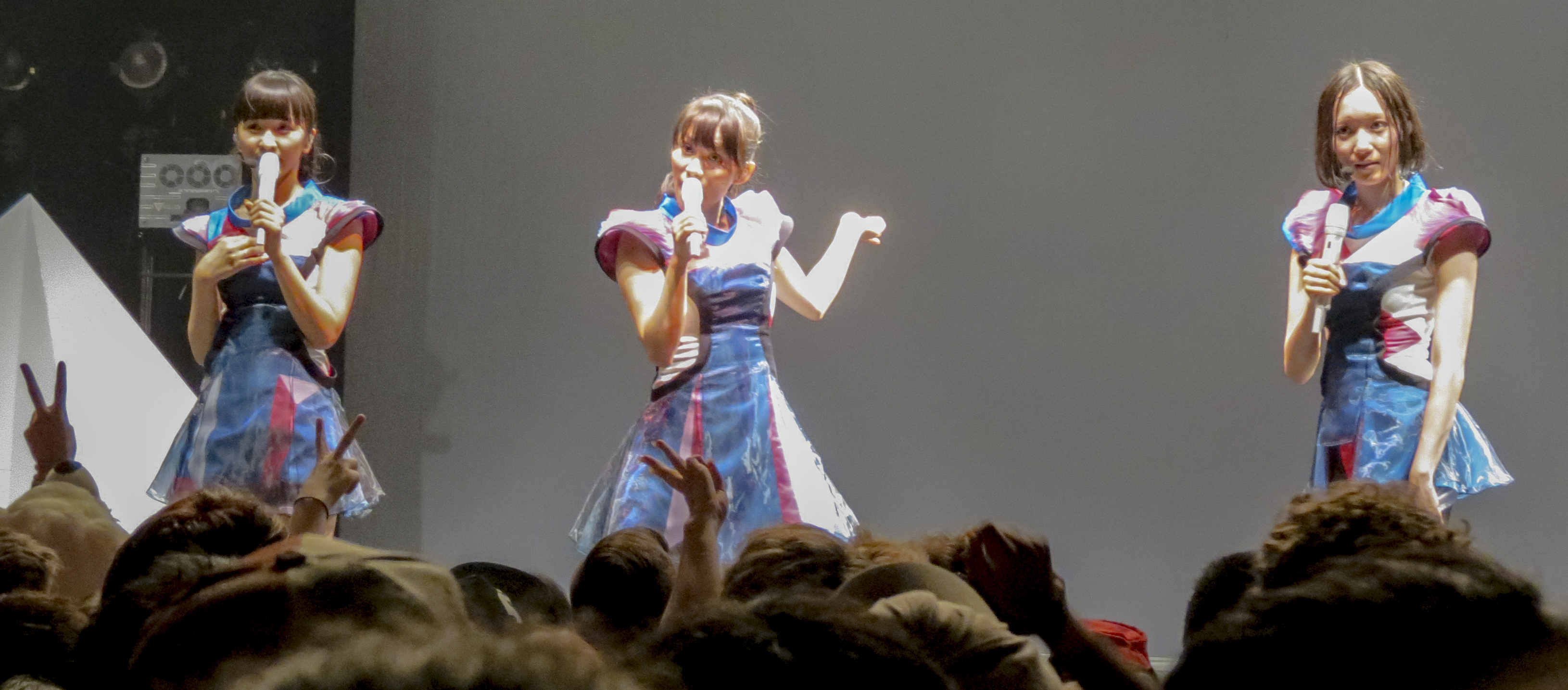 Perfume en el escenario (2013)